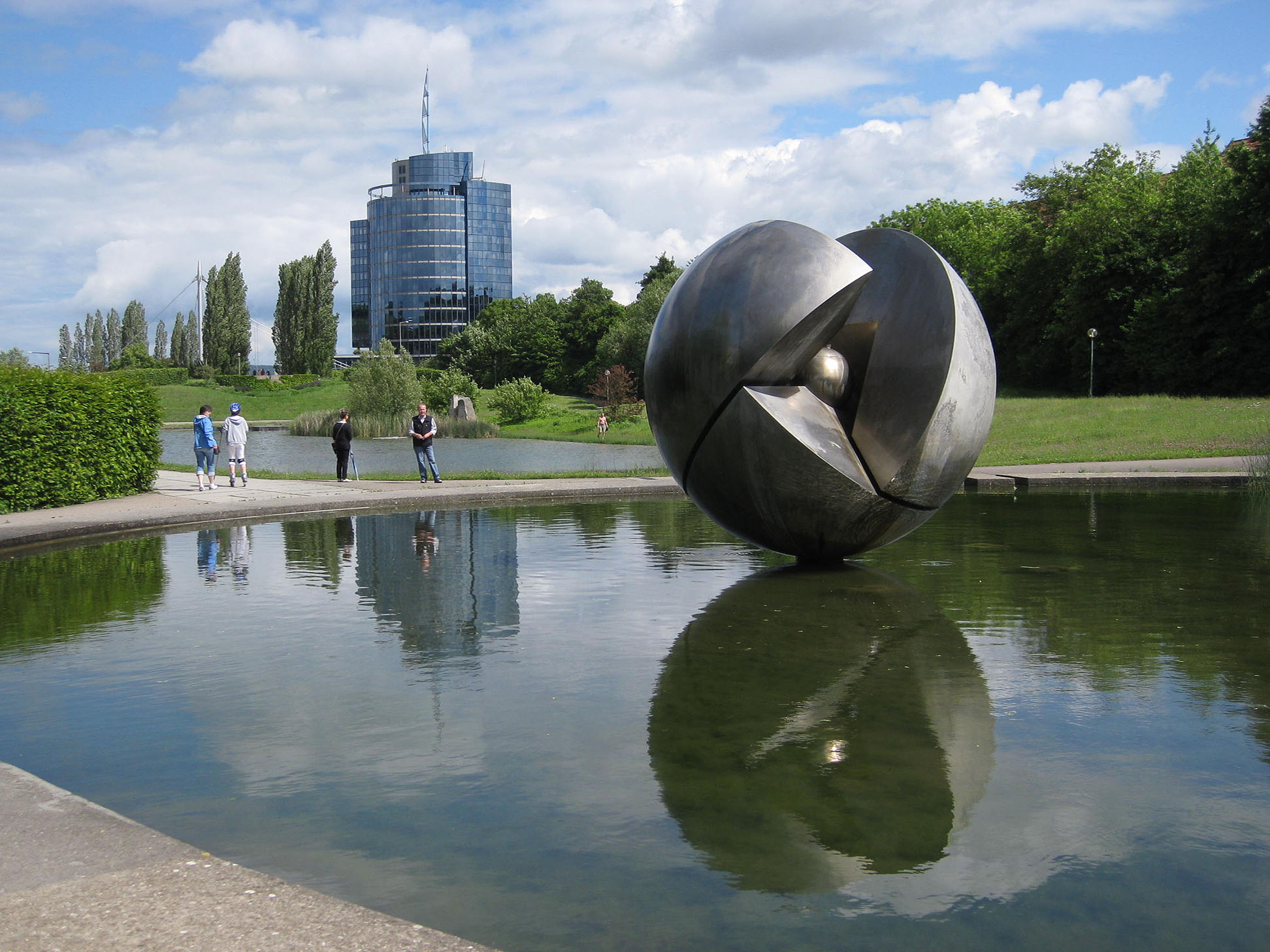 Sculptures in Stuttgart, Killesberg - Gelände der IGA 1993, Hans Dieter Bohnet, Kugelobjekt und Wasserspiele am Egelsee, 1993